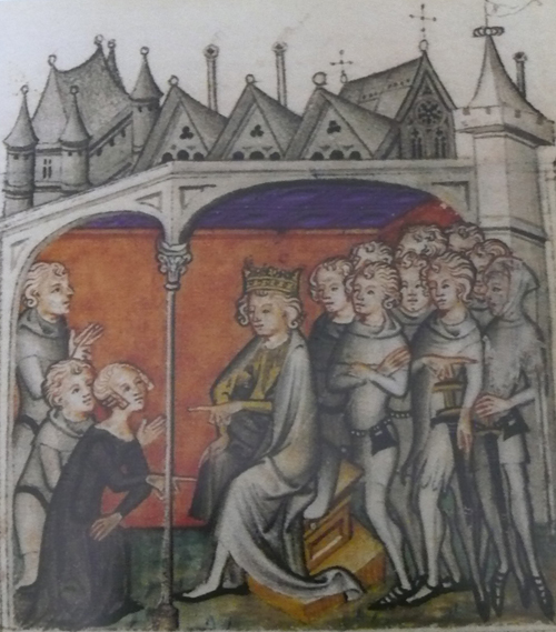 Jan Lucemburský (Soud českého krále)